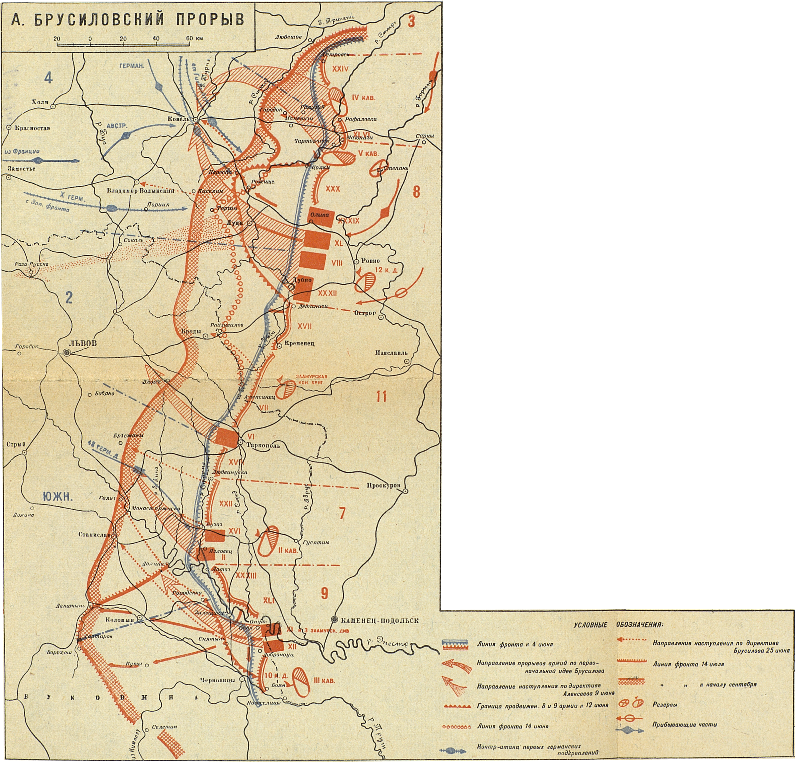 Лист №47. Кампания 1916 года. Русский театр. А. Брусиловский прорыв